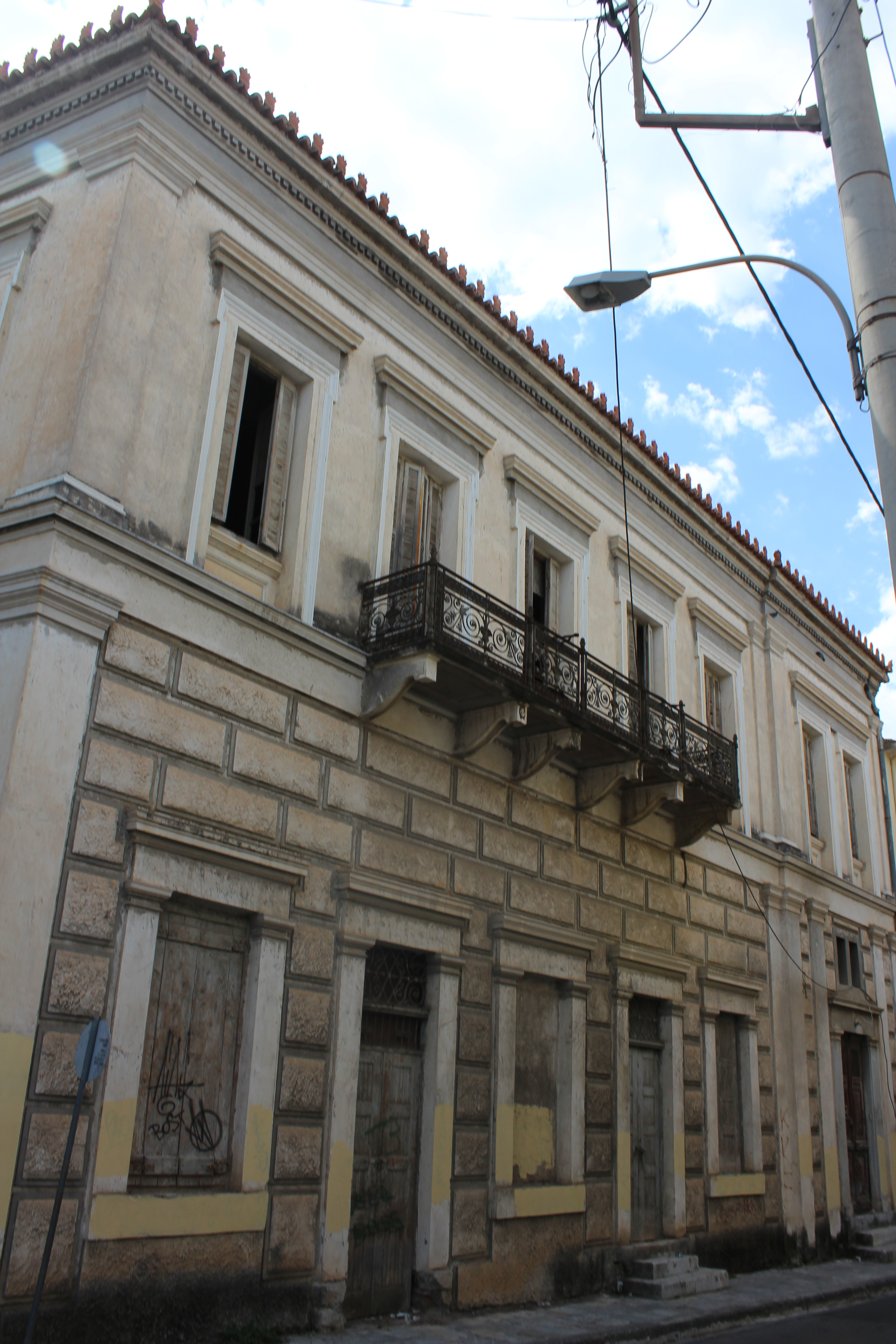 Γαλλικό Ινστιτούτο Καλαμάτας - Οικία Εφεσίου«Γαλλικό Ινστιτούτο Καλαμάτας - Οικία Εφεσίου»